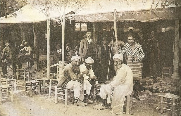 Eski bir kahvehane